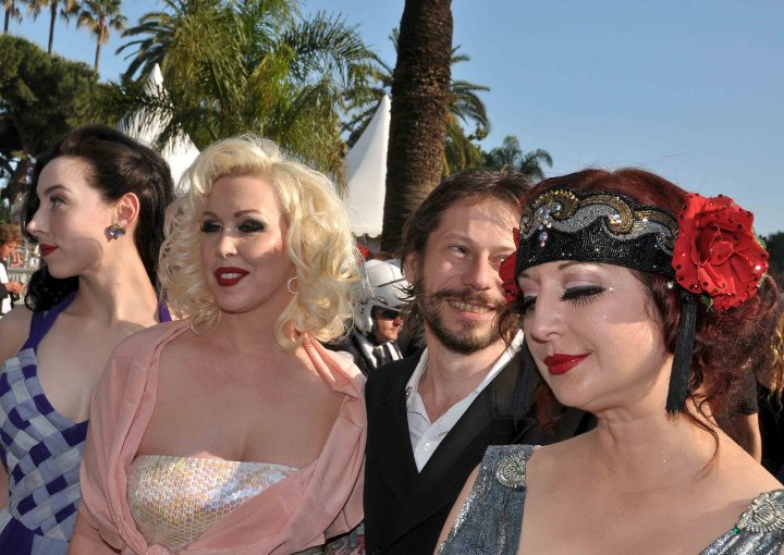 Mathieu Amalric et les actrices (Evie Lovelle, Mimi Le Meaux, et Kitten on the Keys de g. à d.) du film Tournée au festival de Cannes